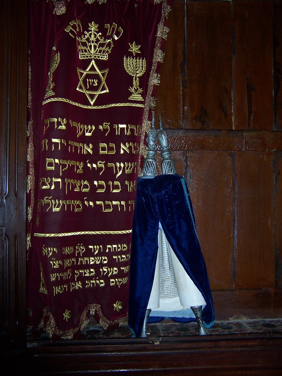 Fez, Morocco